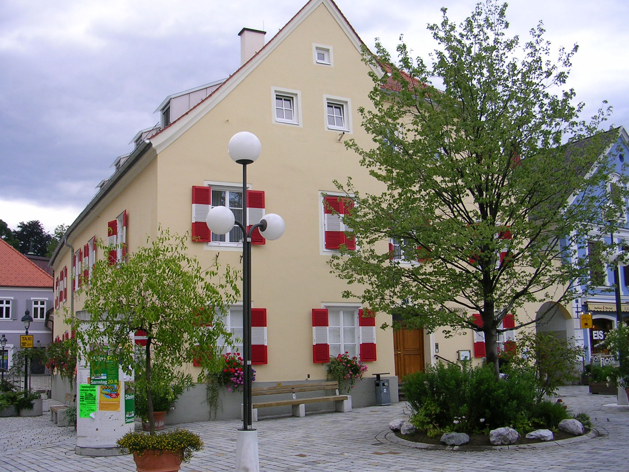 Das Bezirksgericht (ehemaliges Rathaus) am Hauptplatz 9 in Frohnleiten (Bezirk Graz-Umgebung).